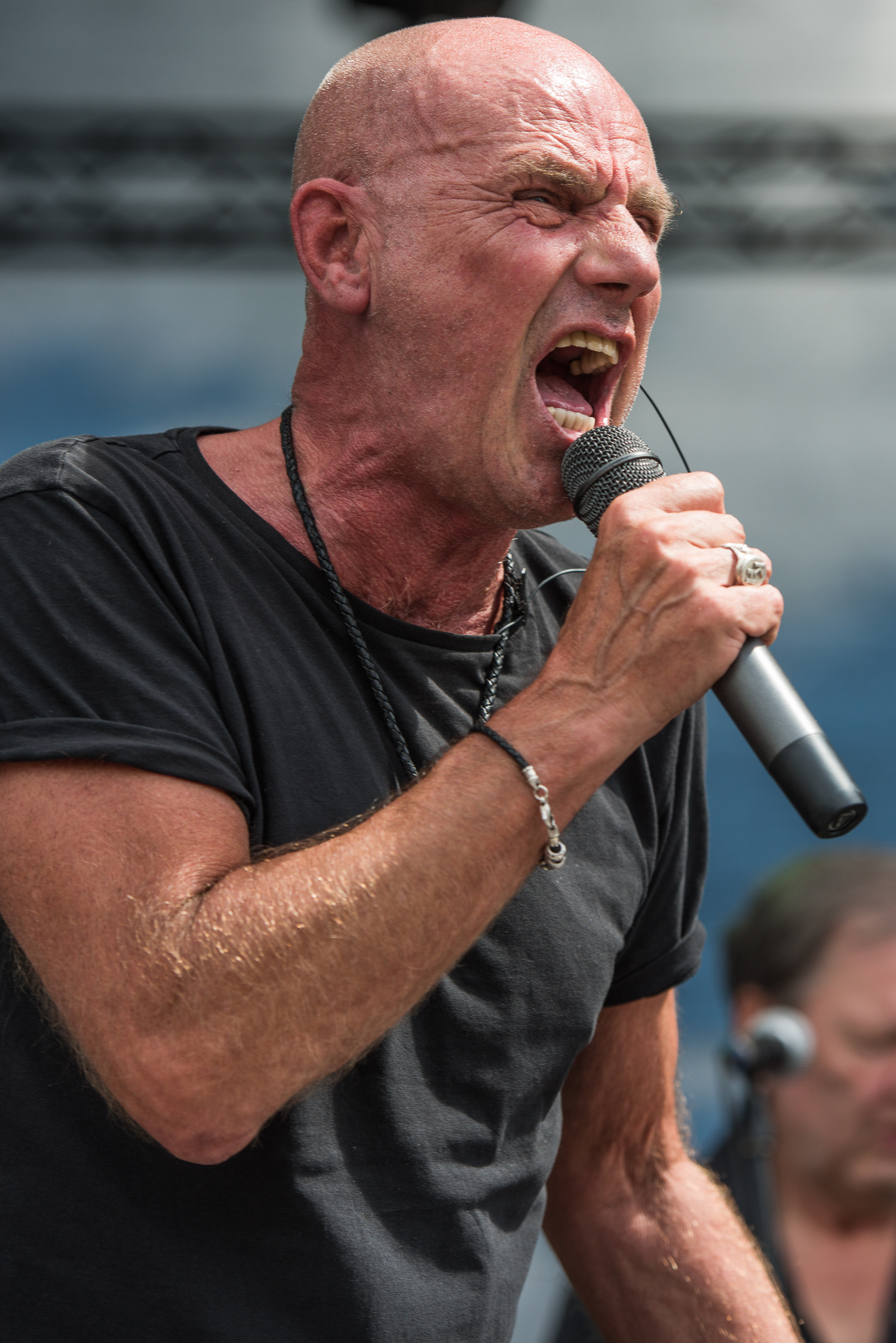 Brombachsee,Concertbüro Franken,Extrabreit,Festival,Kai Havaii,Kay Schlasse,Konzert,Lieder am See,Livekonzert,Livemusik,Musik